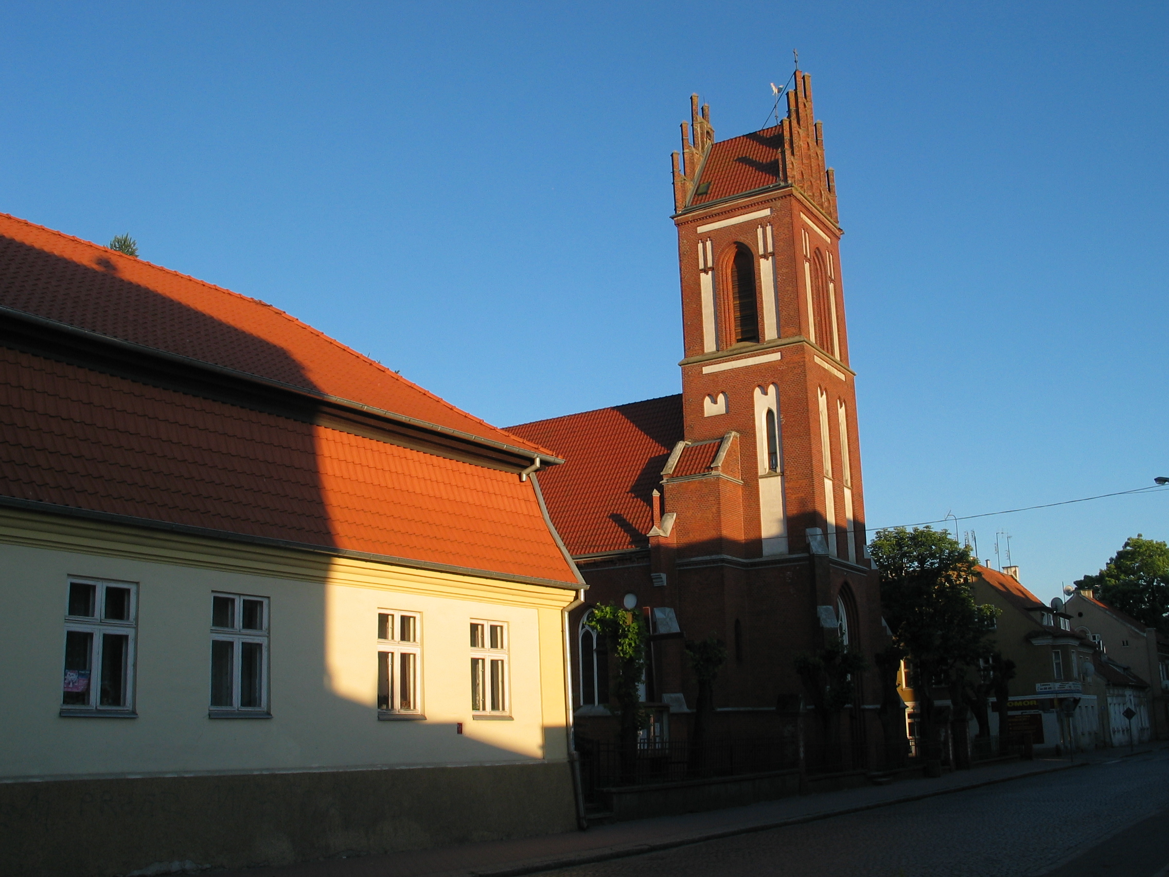 Mrągowo, ul. Królewiecka 30 - rzymskokatolicki kościół parafialny p.w. św. Wojciecha, 1892-1896